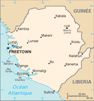 Nom : Carte de Sierra Leone Date : 2005 francisée par Idarvol